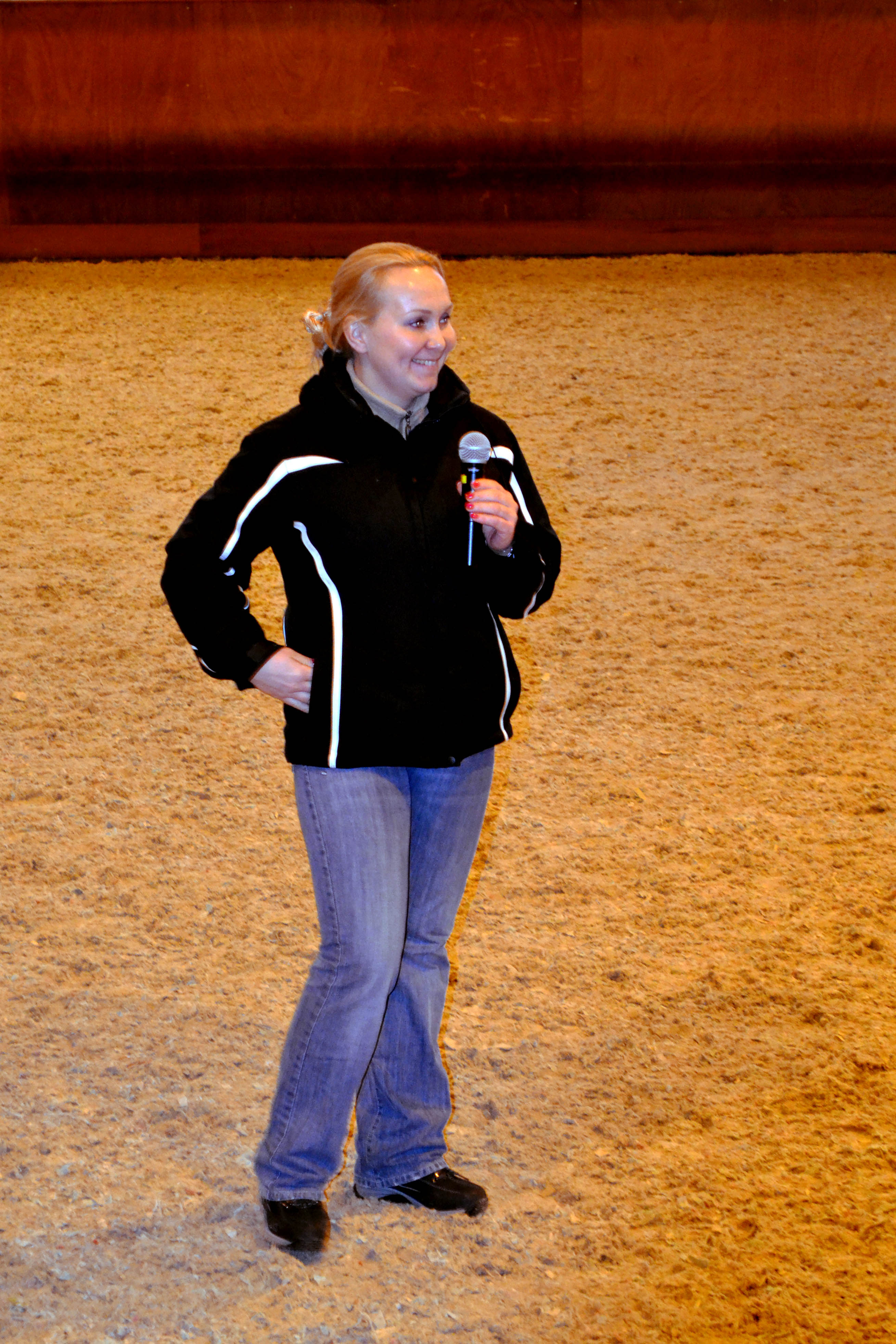 Александра Корелова проводит мастер-класс по выездке в 2014 году